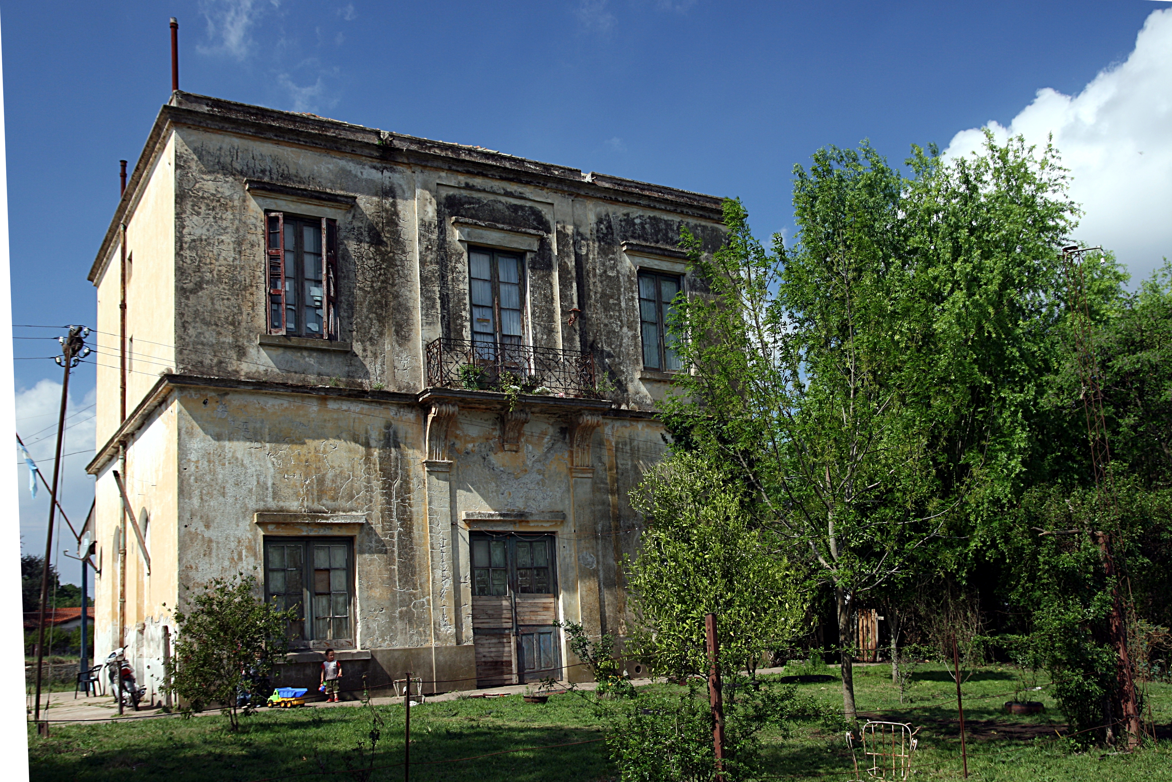 Estación Azcuénaga, Partido de San Andrés de Giles, provincia de Buenos Aires, Argentina.